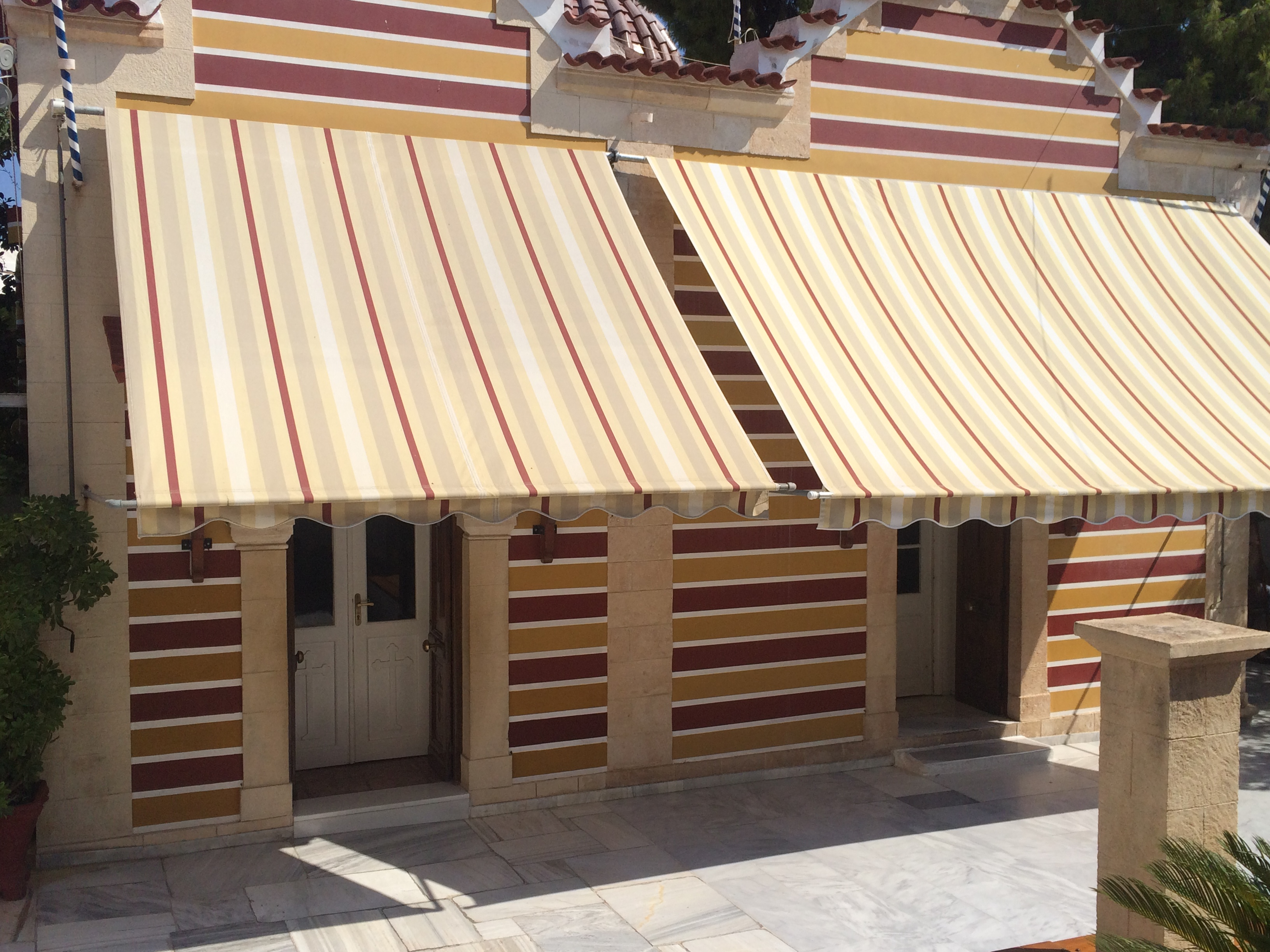 Храм Святой Троицы в монастыре Святой Троицы, Эгина, Греция